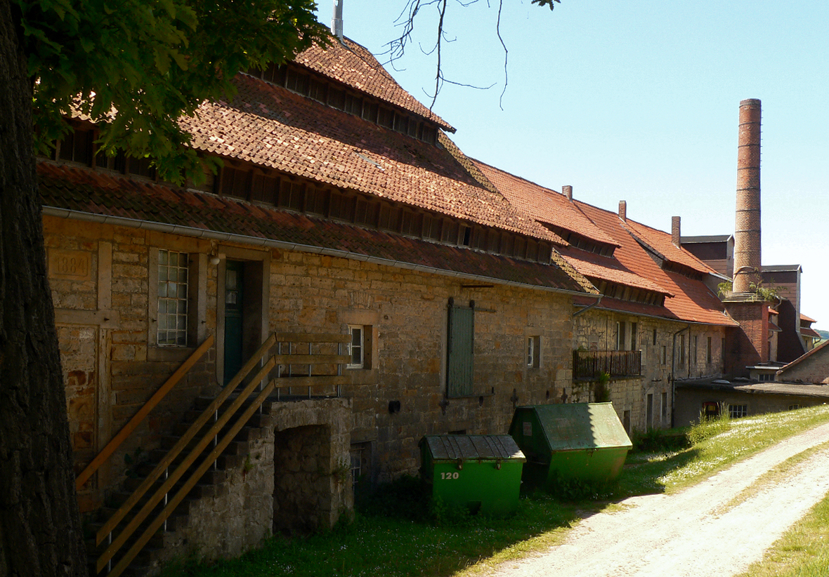 Gutshof Astenbeck